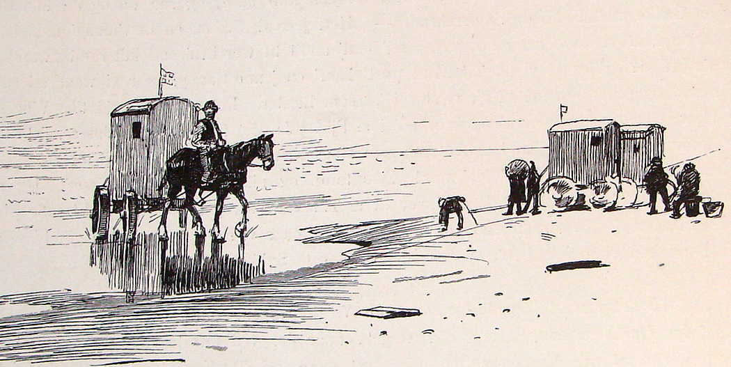 Badevogne ved Fanø Strand i slutningen af 1800-tallet